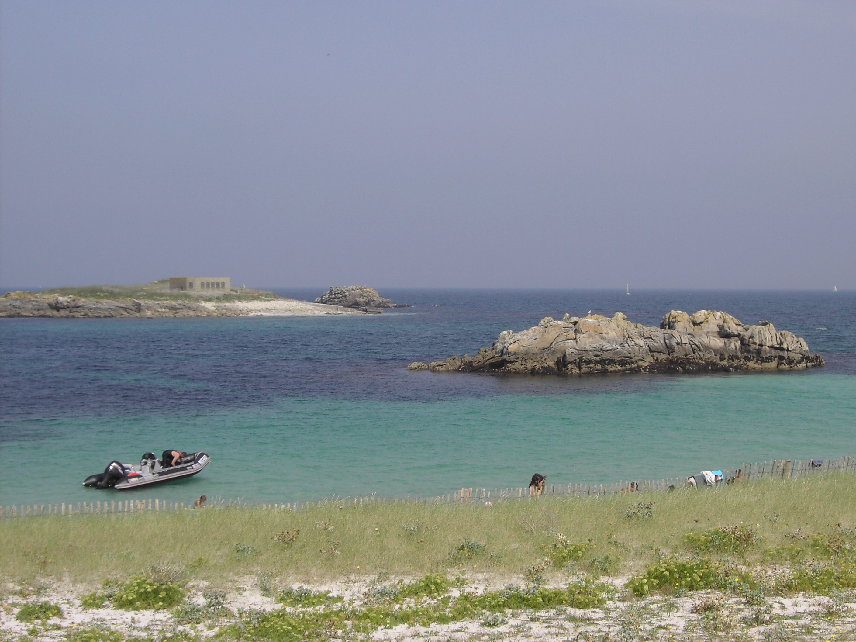 Archipel des Glénan : la prison de l'îlot de Brunec